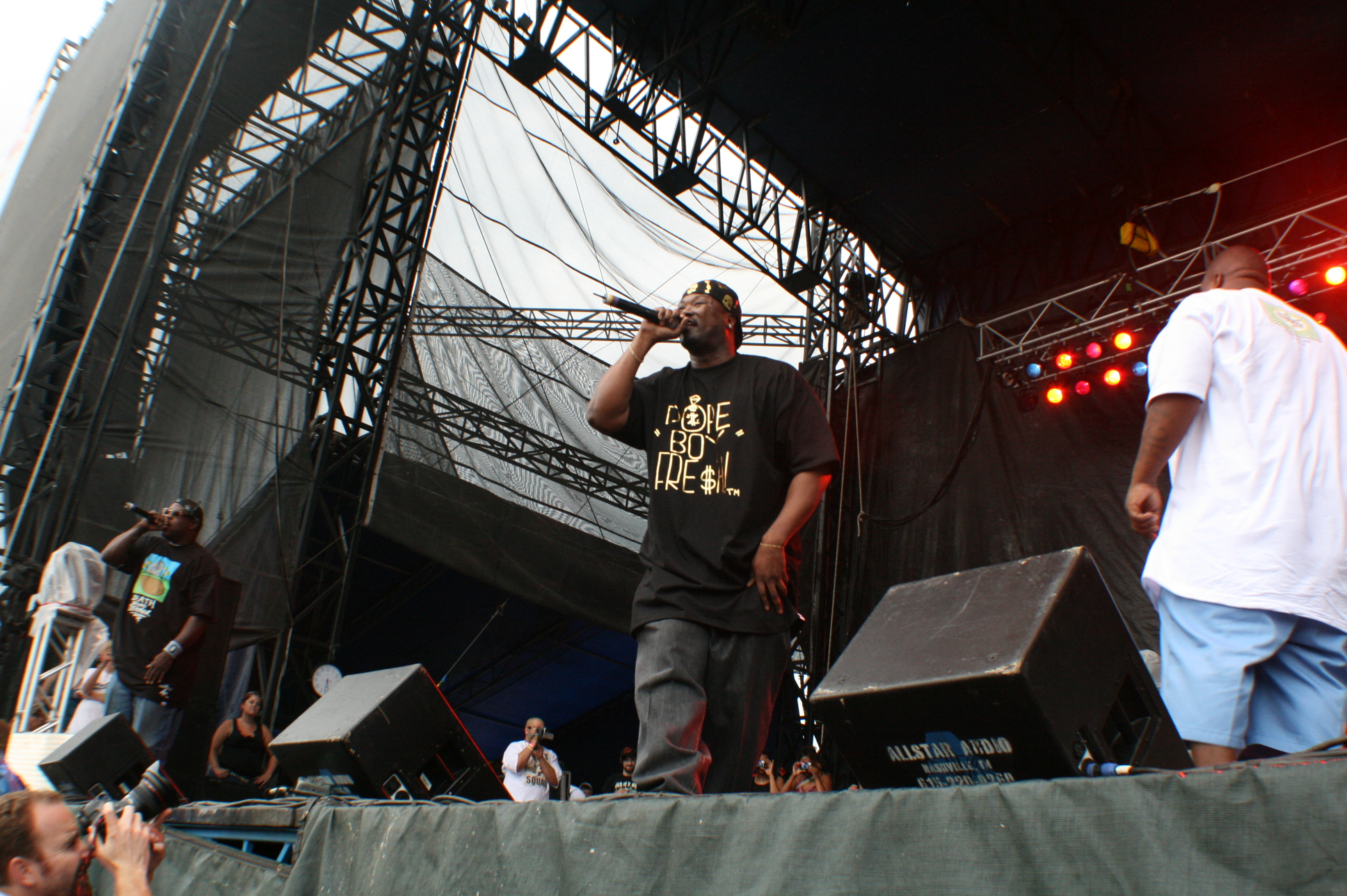 Show Project Pat